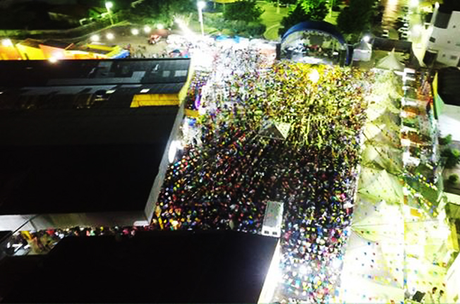 Festa de São João e São Pedro de Cuité Paraíba, O maior do Curimataú e Seridó paraibano. foto areia da primeira edição do são joão da serra 2017.